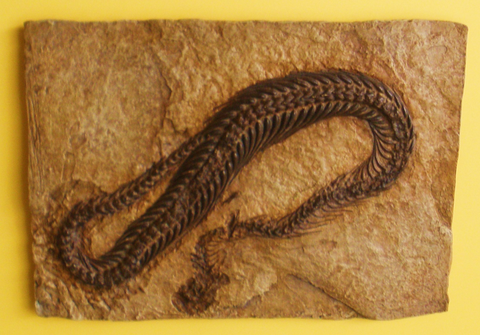 fossil Pachyophis